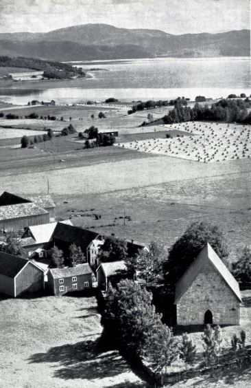 Logtun (Lagatun) kirke på Frosta.